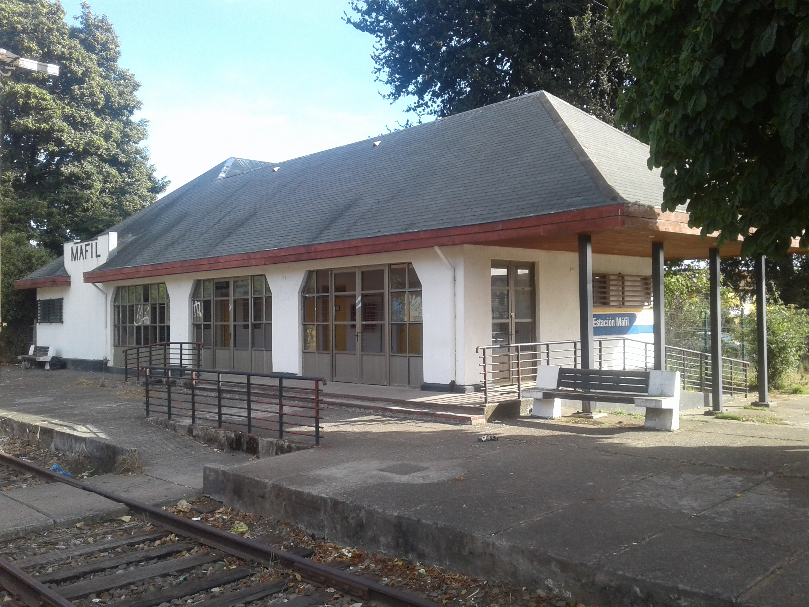 Estación de ferrocarril de Máfil, Región de Los Ríos, Chile